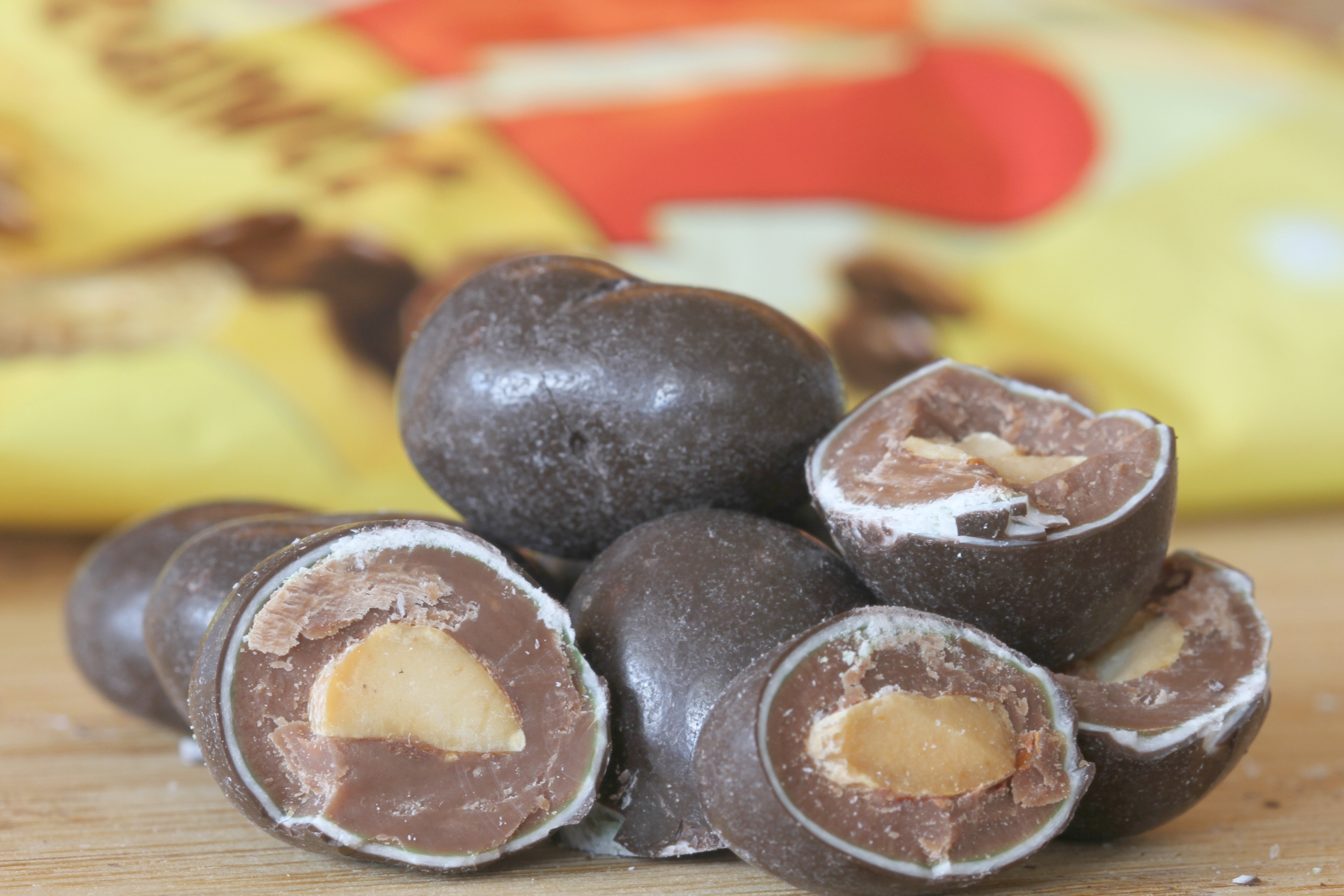 Sjokoladen M.